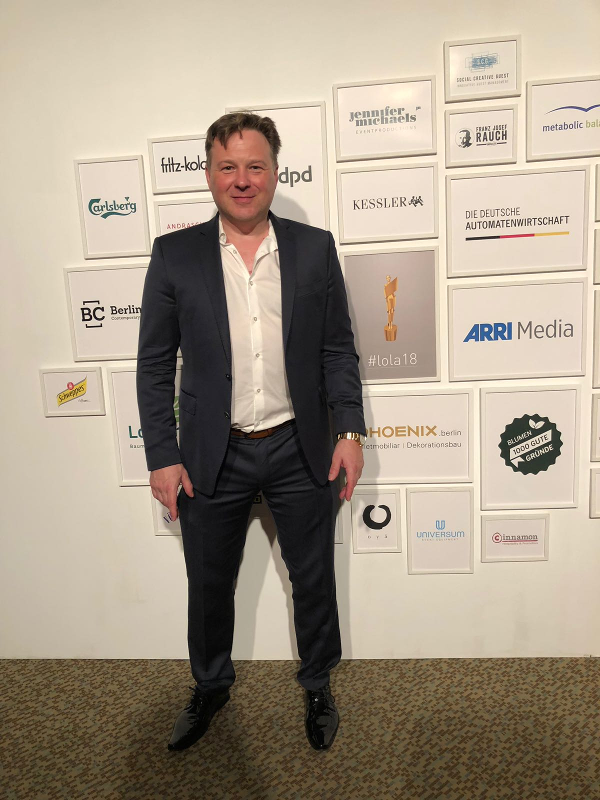 Lola 2018